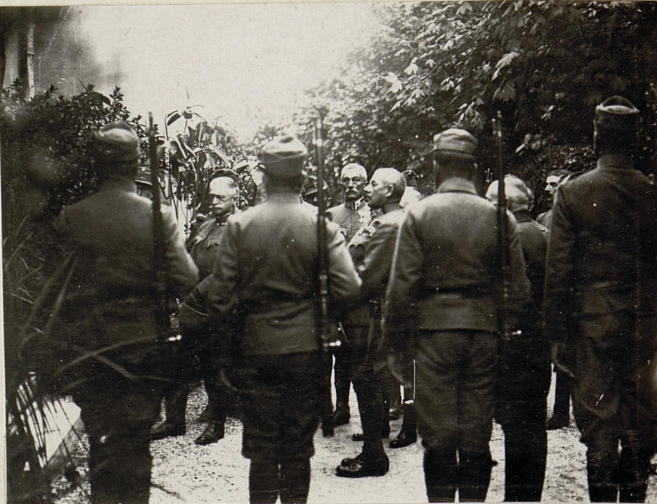 Begräbnis Feldmarschallleutnant .Artur von Mecenseffy